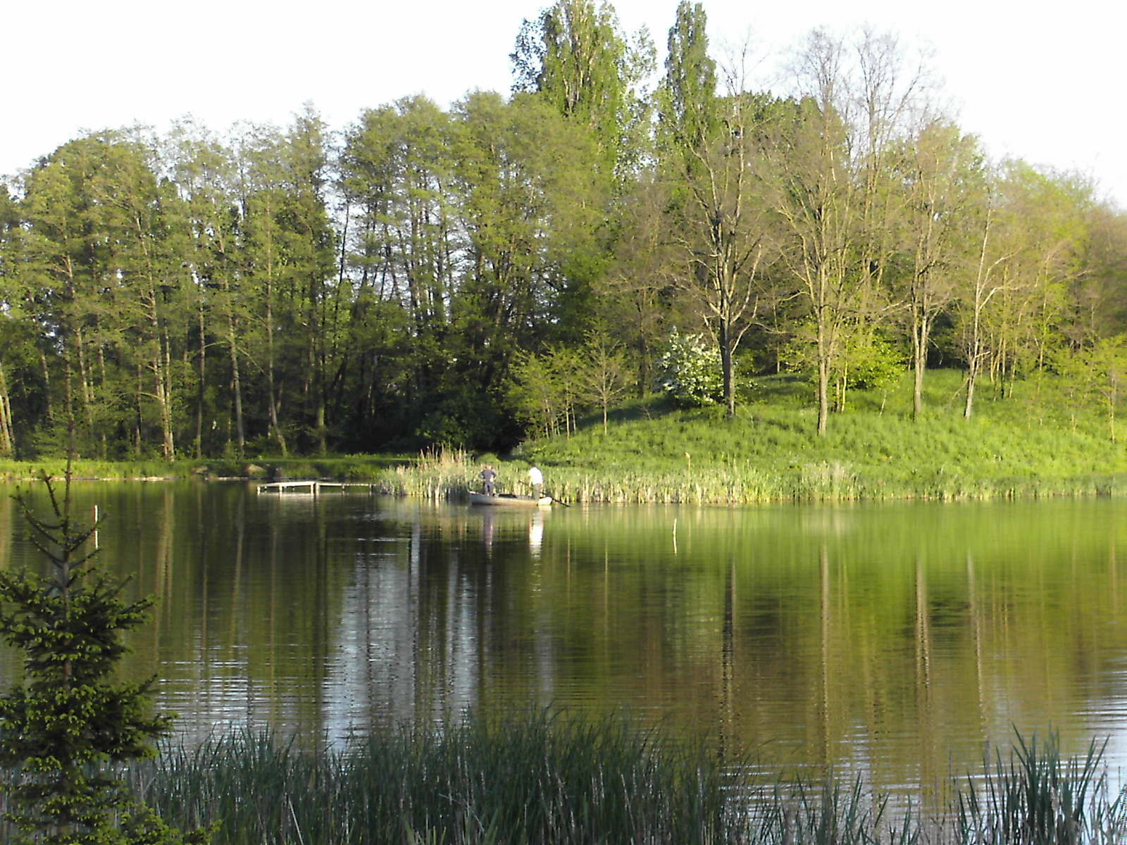 Mezőcsokonya úrtava